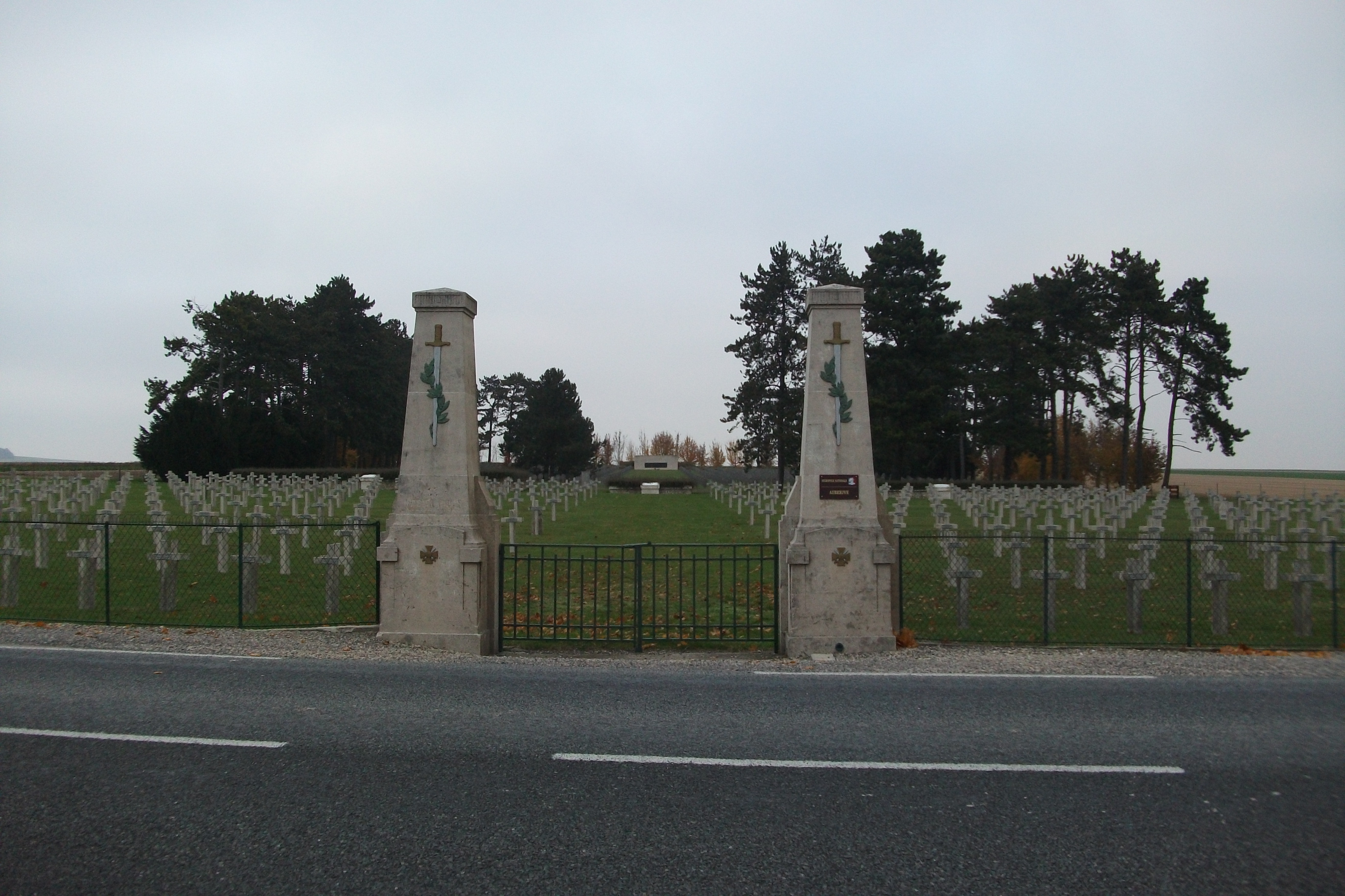 entrée de la Nécropole nationale (Aubérive), tout au fond le monument allemand.